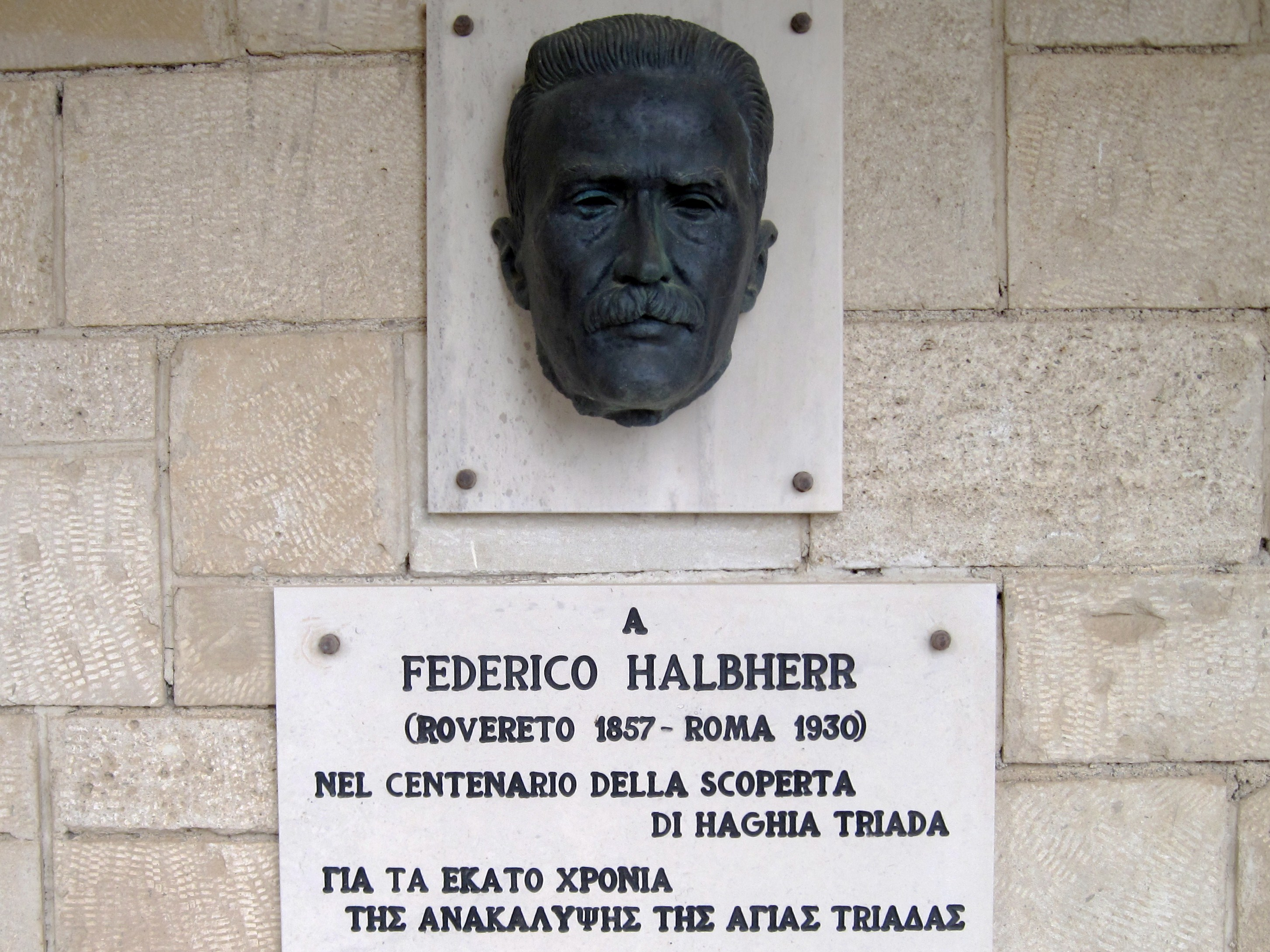 Gedenktafel an den Archäologen Frederico Halbherr in der Ausgrabungsstätte von Agia Triada in der Gemeinde Festos, Regionalbezirk Iraklio, Kreta, Griechenland